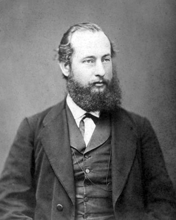 Wilhelm Hasenclever (1837–1889), letzter Präsident des Allgemeinen Deutschen Arbeitervereins (ADAV), einer Vorläuferpartei der SPD, 1884